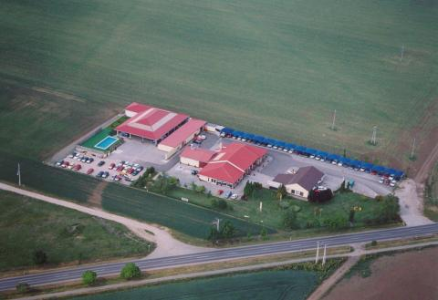 Suzuki Varga, Rákóczi u. 2, Lánycsók, Hungary, aerialphotography